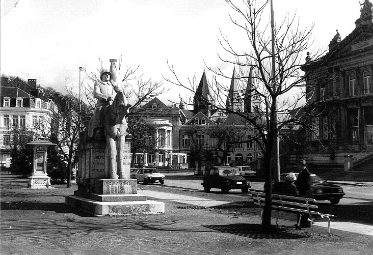 Spa